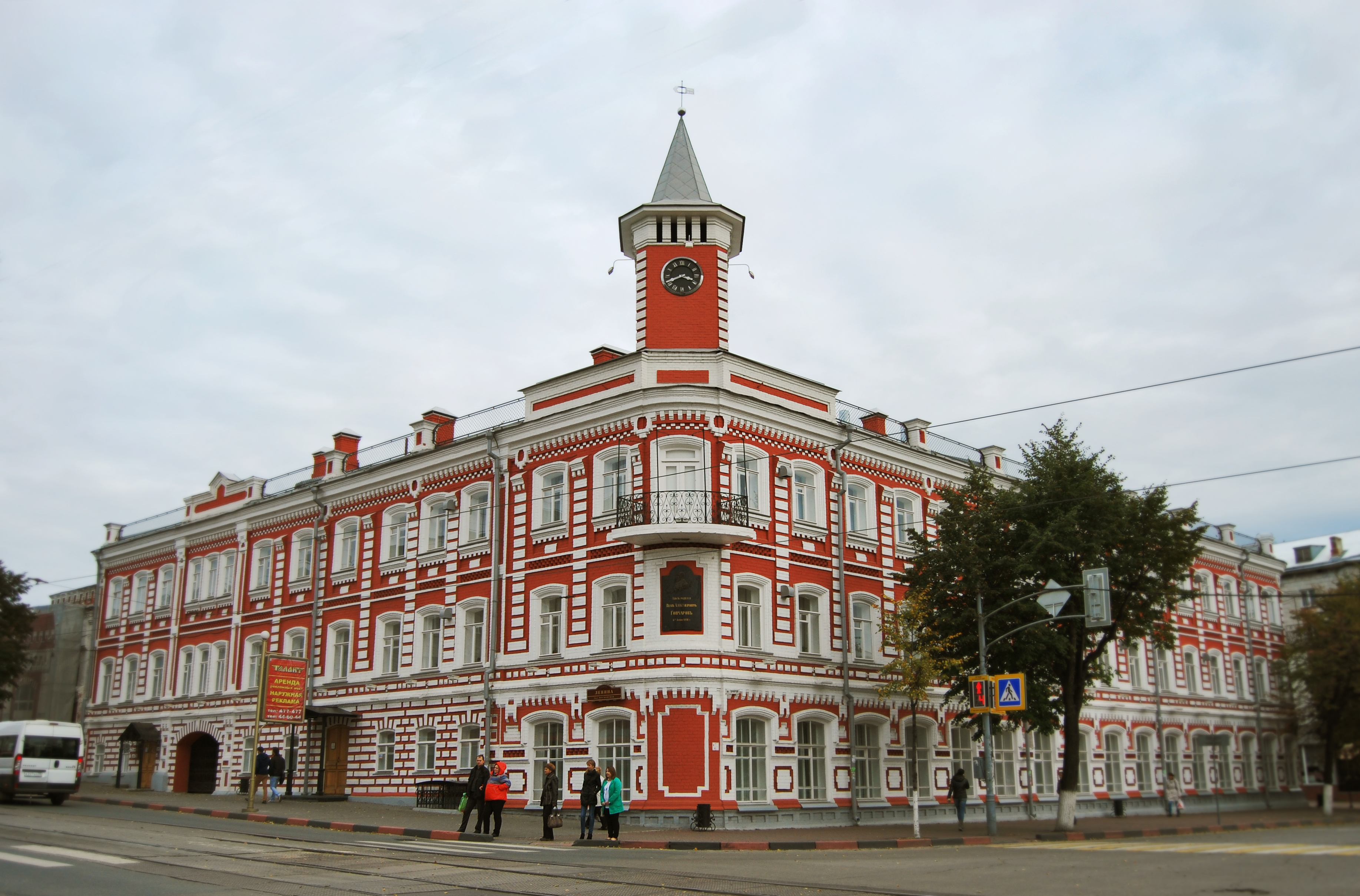 Усадьба Гончаровых-Юргенс (Ульяновская область, Ульяновск, Гончарова улица, 20/34, улица Ленина, 138)